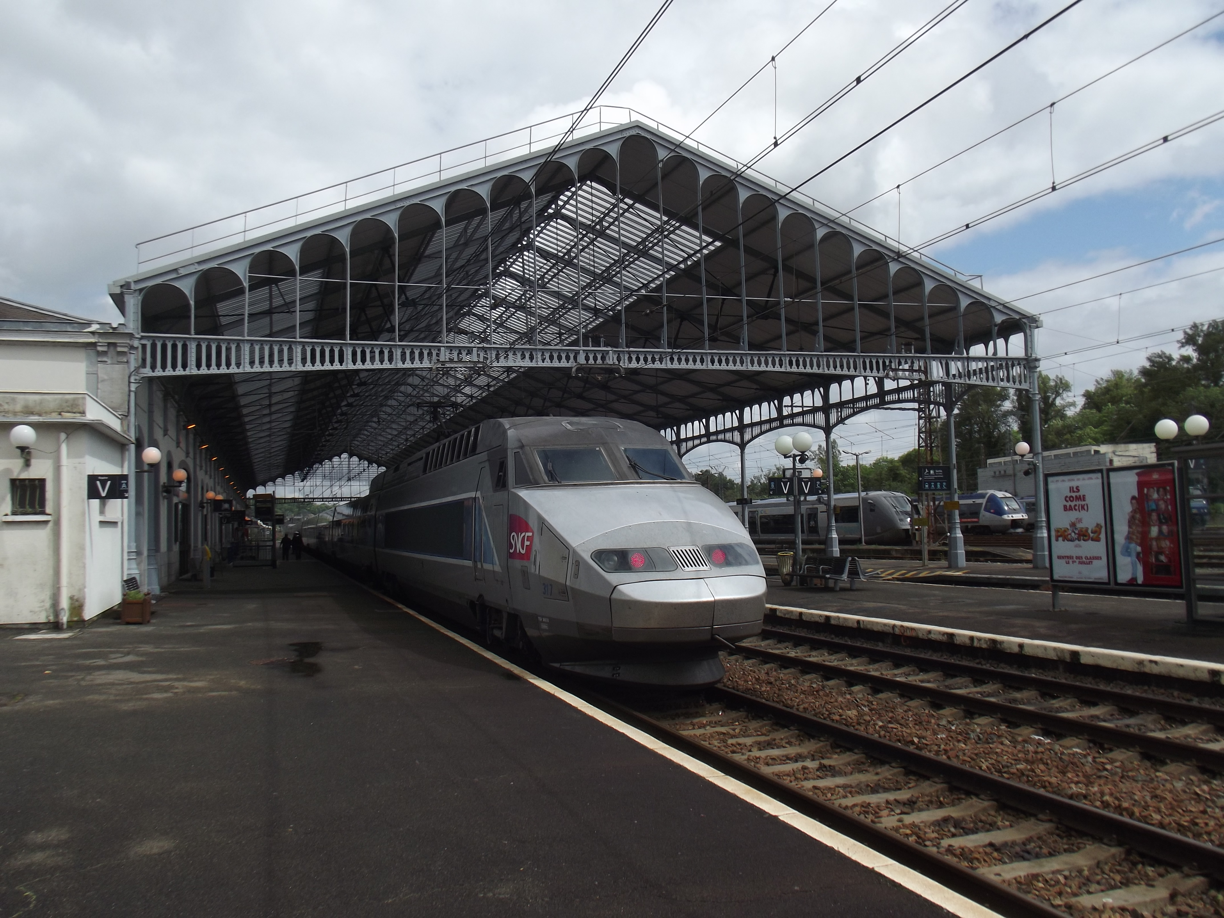 TGV Atlantique in het station Pau